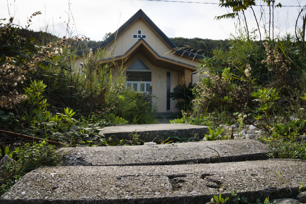 Veduta dall'ex tracciato della Ferrovia Adriatica